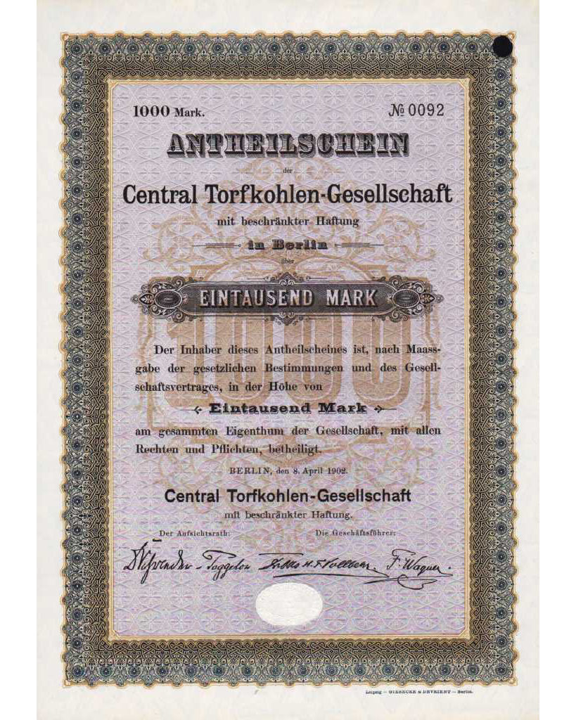 Anteilschein der Central-Torfkohlen-Gesellschaft 1902